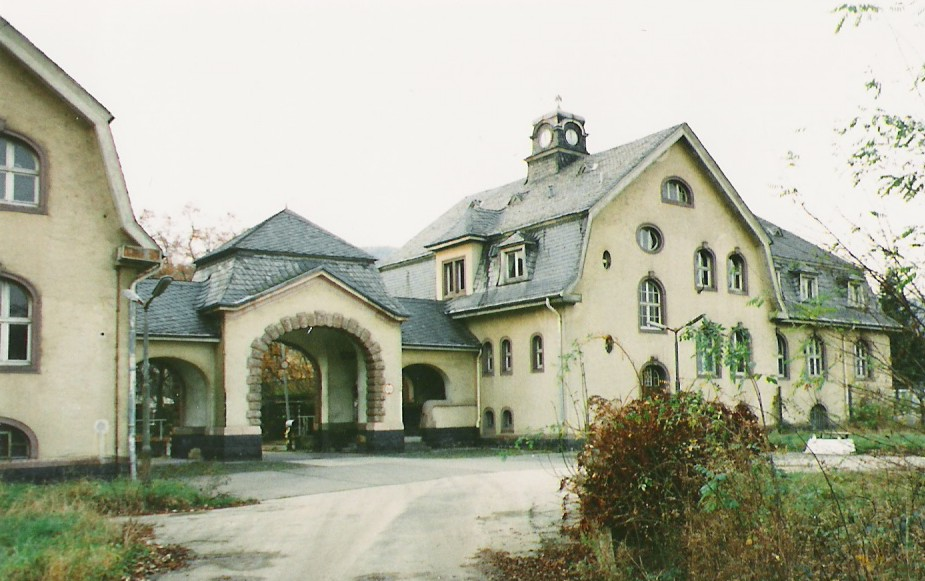 Eurener Straße 59, Trier. Die ehemalige Direktorenvilla des 1986 geschlossenen Eisenbahn-Ausbesserungswerks Trier-West 1994. Das Gebäude wurde 2008 als Wohnhaus saniert.